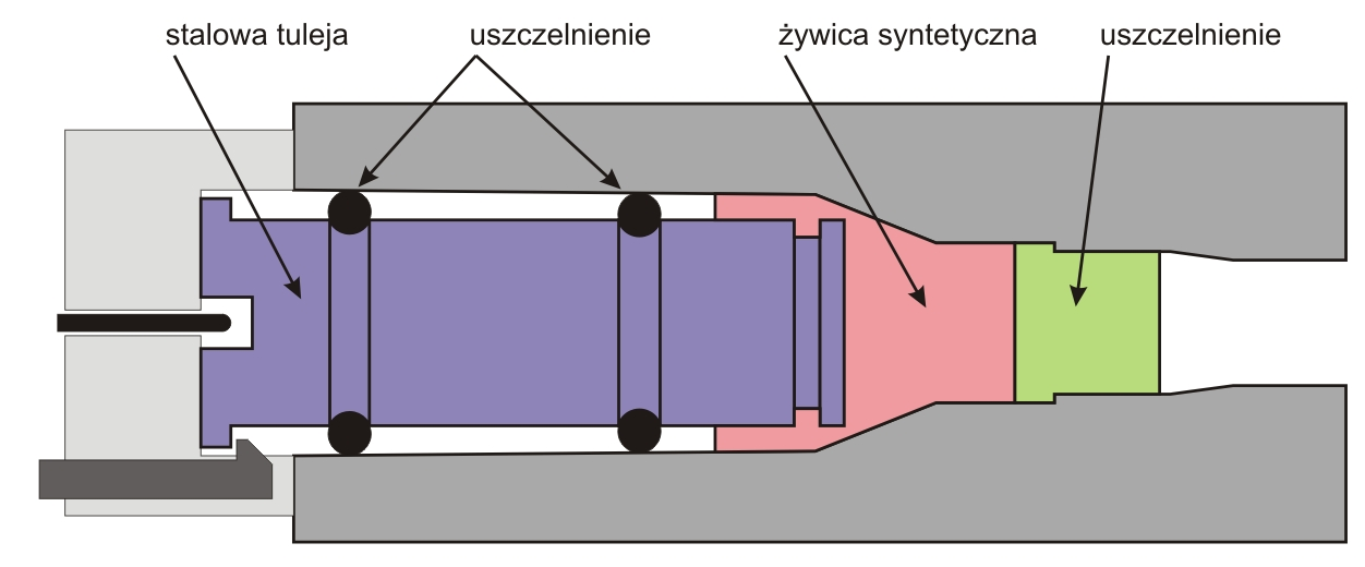 odlew komory nabojowej